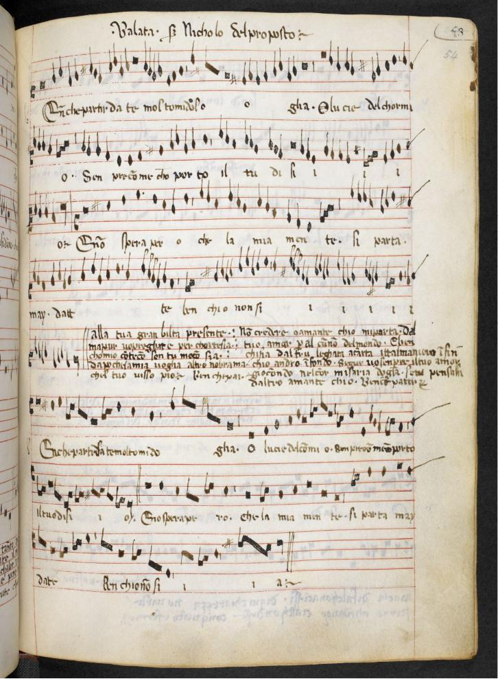 London, British Library, Additional 29987